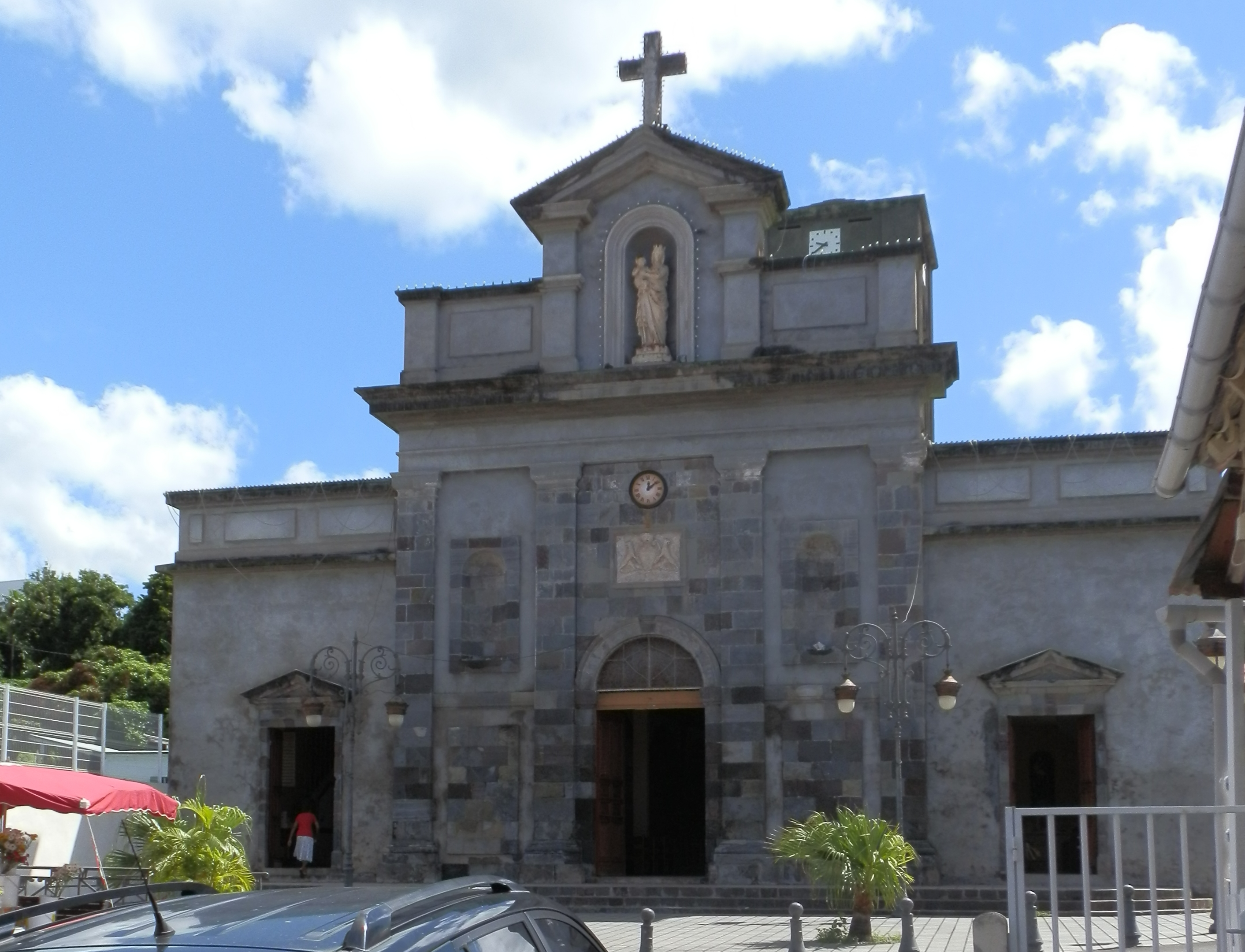 Église Notre-Dame-du-Mont-Carmel, Allée du Mont-Carmel (Inscrit, 2006) .